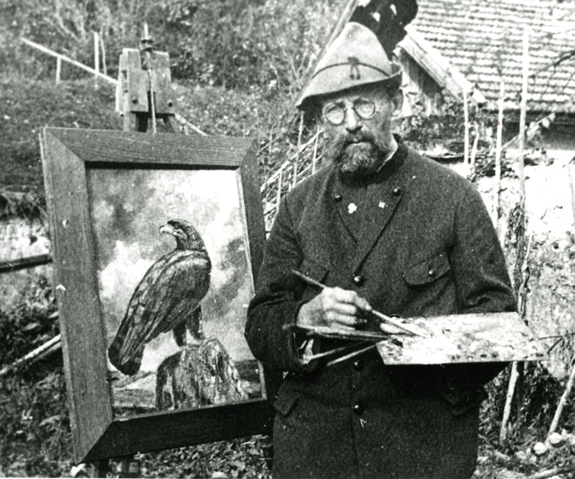 Foto von Richard Strebel Tiermaler